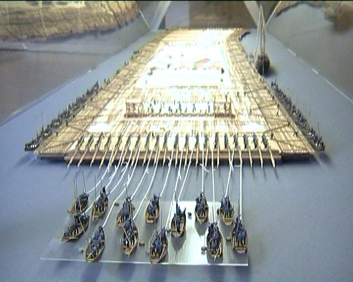 Modell eines “Holländerfloßes” im Stadtmuseum Köln, Maßstab unbekannt, ca. 1:100 geschätzt